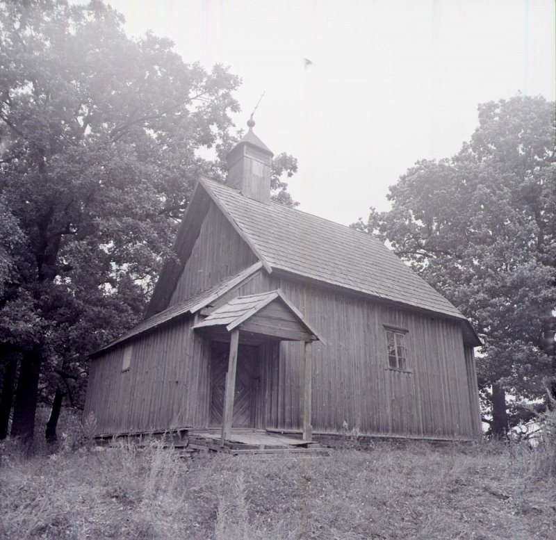 Беларуская (тарашкевіца): Дамашаны (Damašany). Царква Сьвятога Яна Багаслова